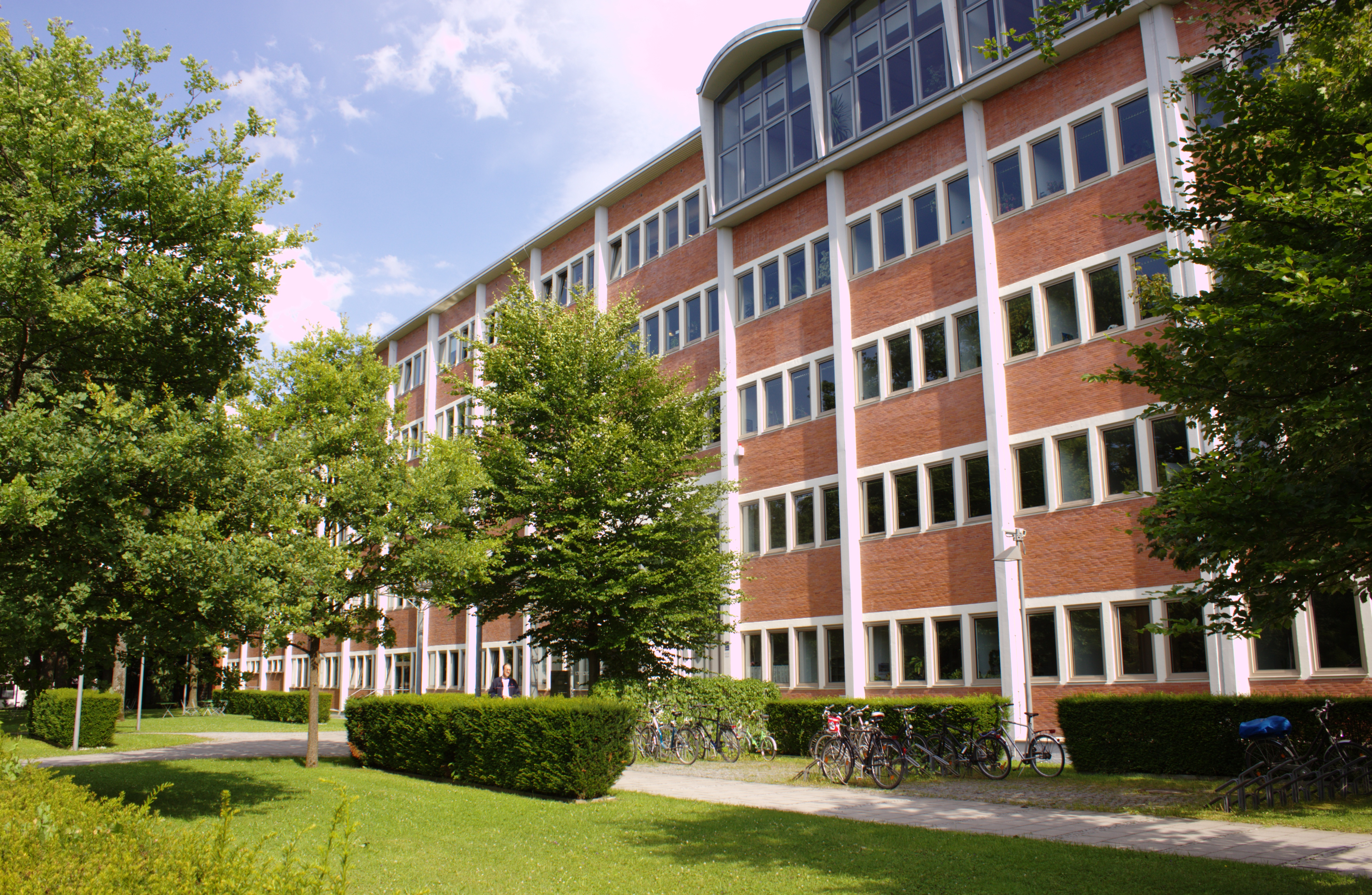 Das Bundespatentgericht in München. Fotografiert im Rahmen des Landtagsprojektes Bayern 2012. Wikipedia im Landtag – Bayern 17. bis 19. Juli 2012 in München Dieses Foto wurde im Rahmen des Projektes „Wikipedia im Landtag“ erstellt.